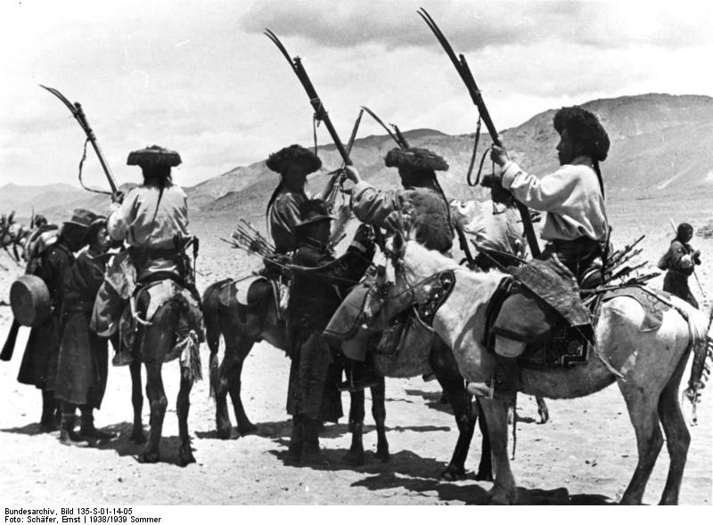 Gyantse, Reiterschießen